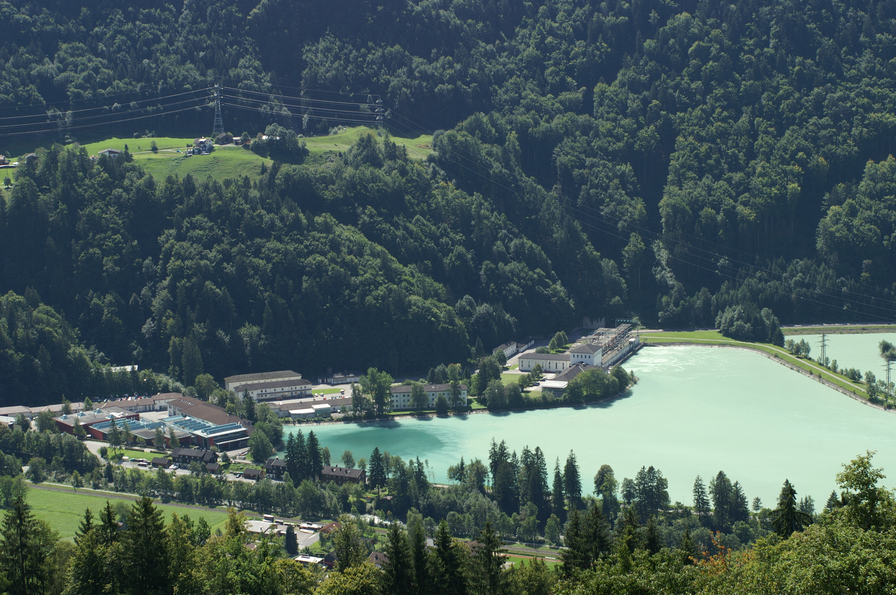 Kraftwerk der Vorarlberger Illwerke in Rodund, bei Vandans, Vorarlberg